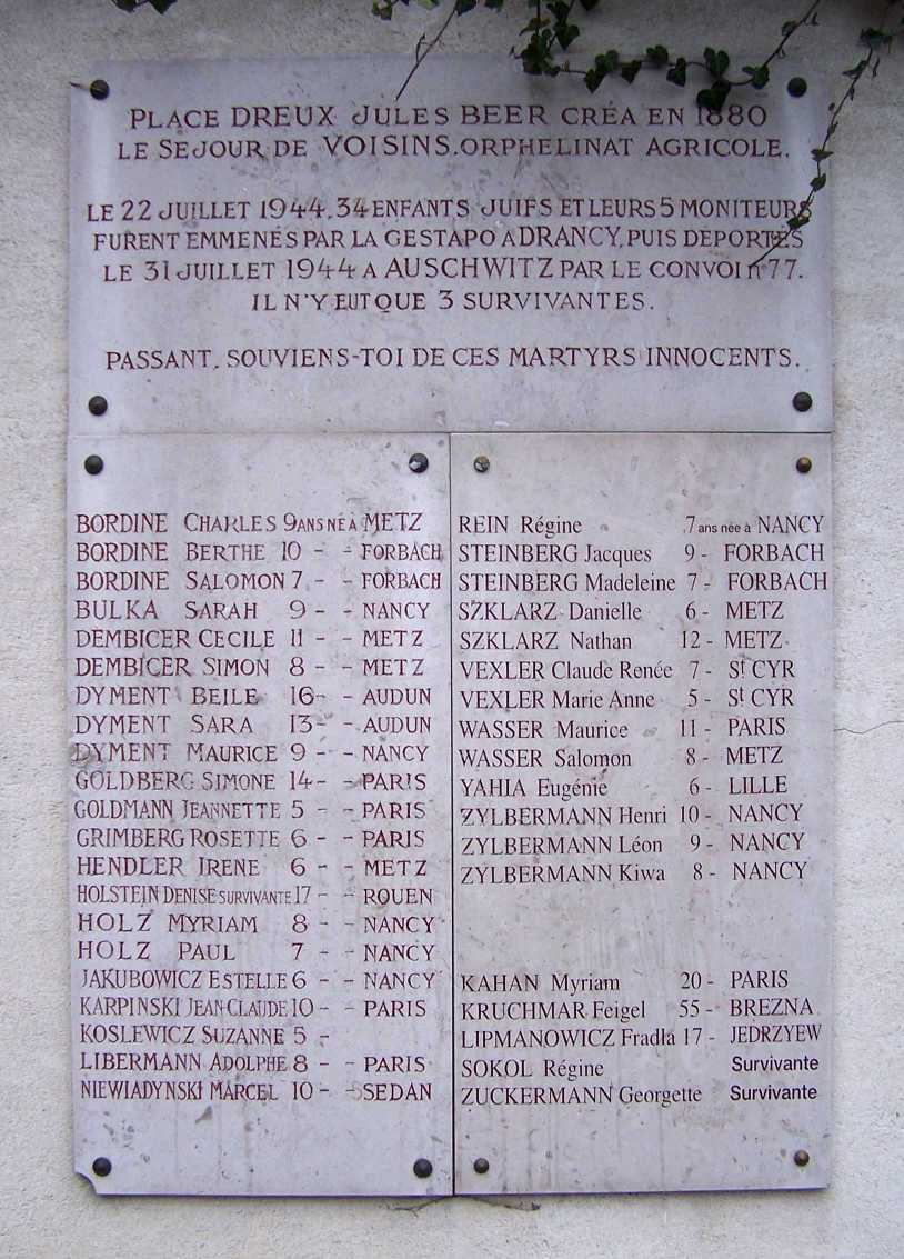 Plaque commémorative à Voisins, commune de Louveciennes (Yvelines, France)